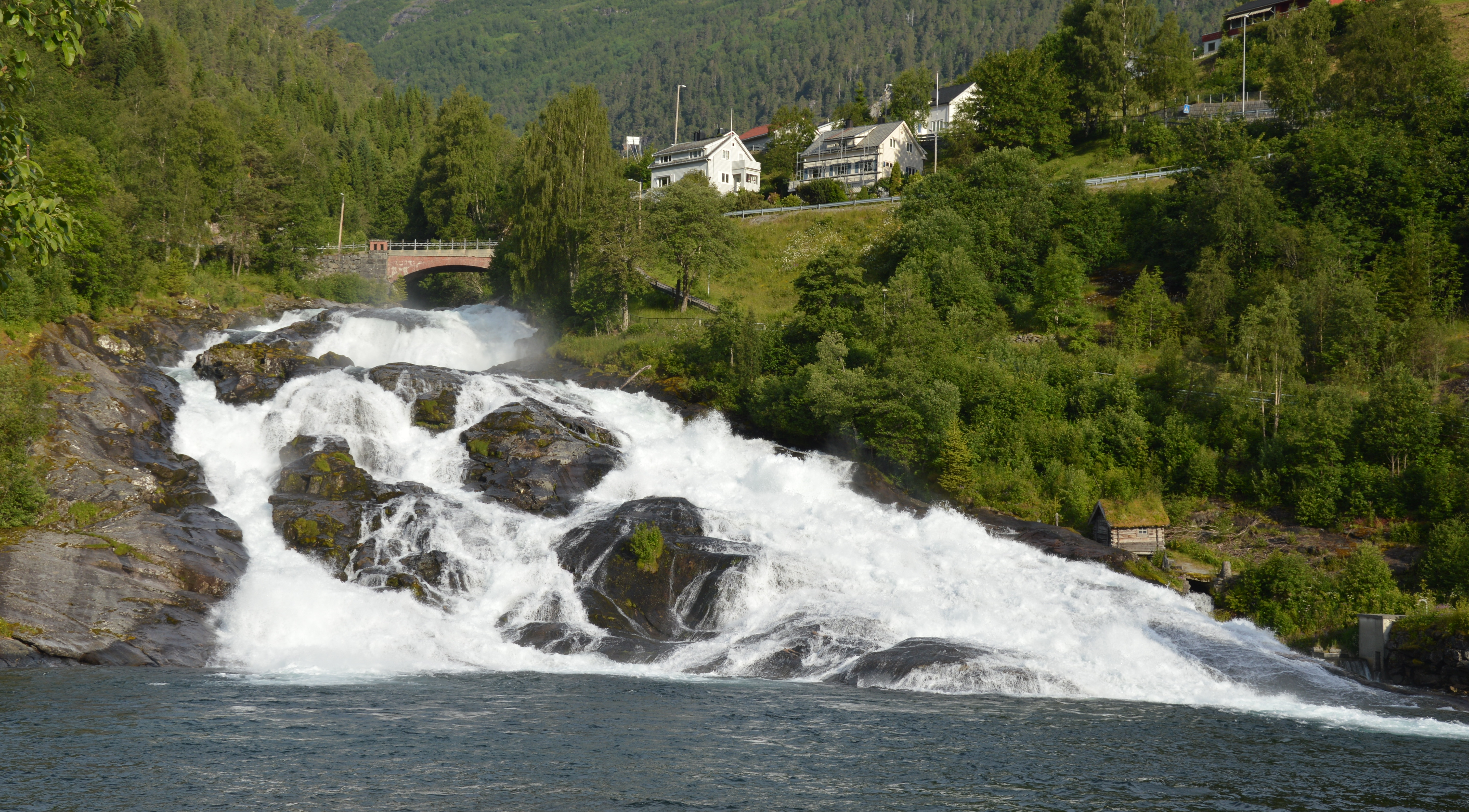 Hellesyltfossen